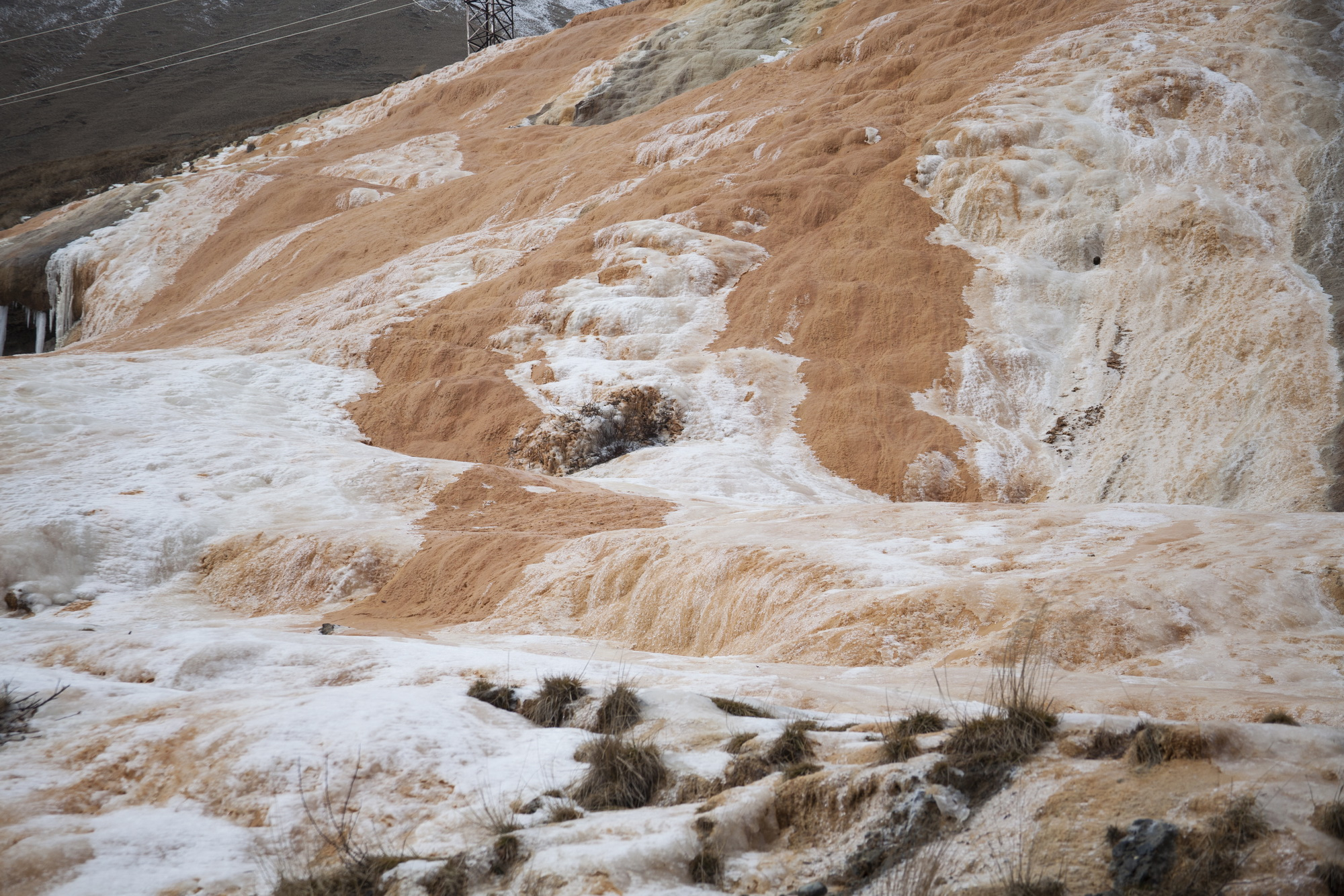 ჯვრის უღელტეხილის ტრავერტინის ბუნების ძეგლი ღირსშესანიშნაობა: მდ. ბიდარას ხეობაში რამდენიმე ადგილას არის წყაროების მიერ დალექილი კიროვანი ტრავერტინების დანაგროვები. ისინი მეტწილად დაკავშირებულია კარბონატულ წყებასთან. ტრავერტინების ერთ-ერთი უმნიშვნელოვანესი და თვალწარმტაცი ადგილსამყოფელი მდ. ბიდარას მარცხენა ნაპირზე საავტომობილო გვირაბის სიახლოვეს მდებაროებს. აქ გამჭირვალე წყალი, ფერდობის თეთრ ზედაპირზე თხელ ფენად ეშვება და თვალისმომჭრელ, ინტენსიური განვითარების პროცესში მყოფი ტრავერტინს წამოქნის. მდებარეობა: ყაზბეგის მუნიციპალიტეტი, მდ. ბიდარას ხეობა, კობი-გუდაურის საავტომობილო გზის მიმდებარედ, 2197 მეტრი ზღვის დონიდან. კოორდინატები: N42 31.913 E44 28.325